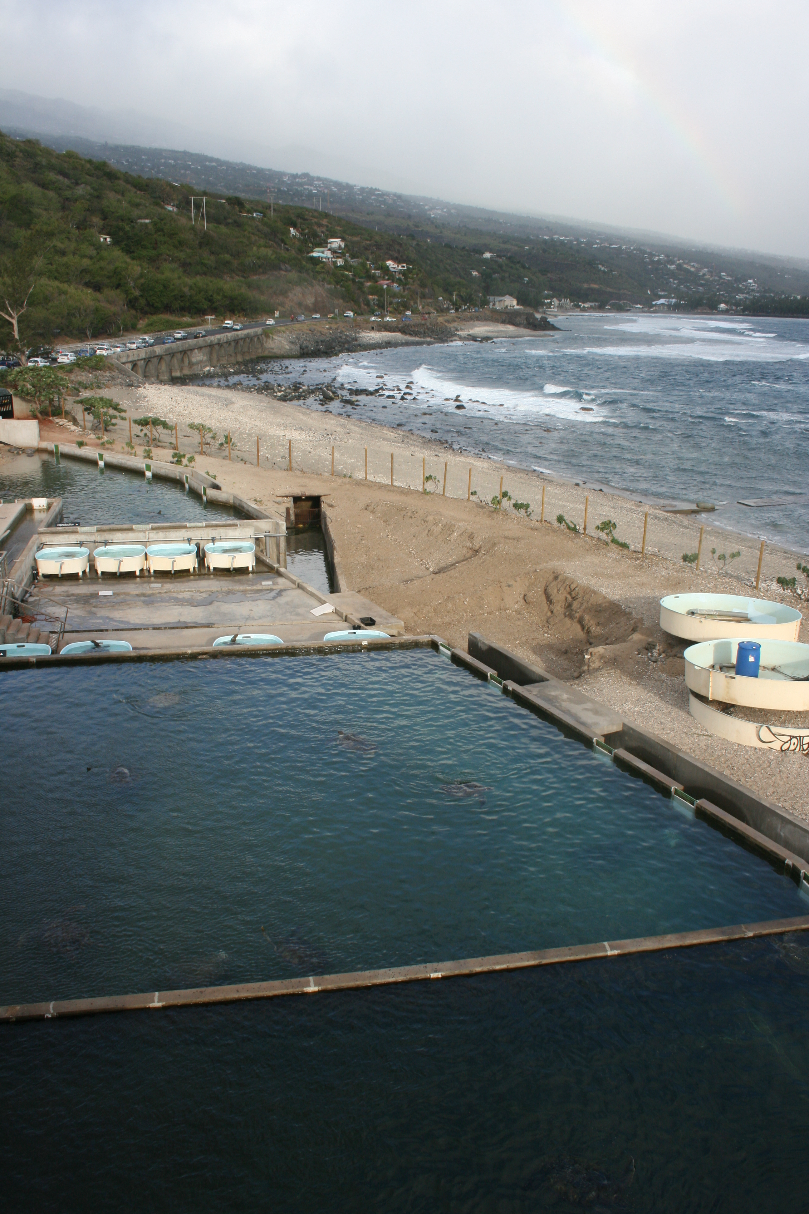 Les bassins de Kélonia avec la baie de Saint-Leu en arrière-plan